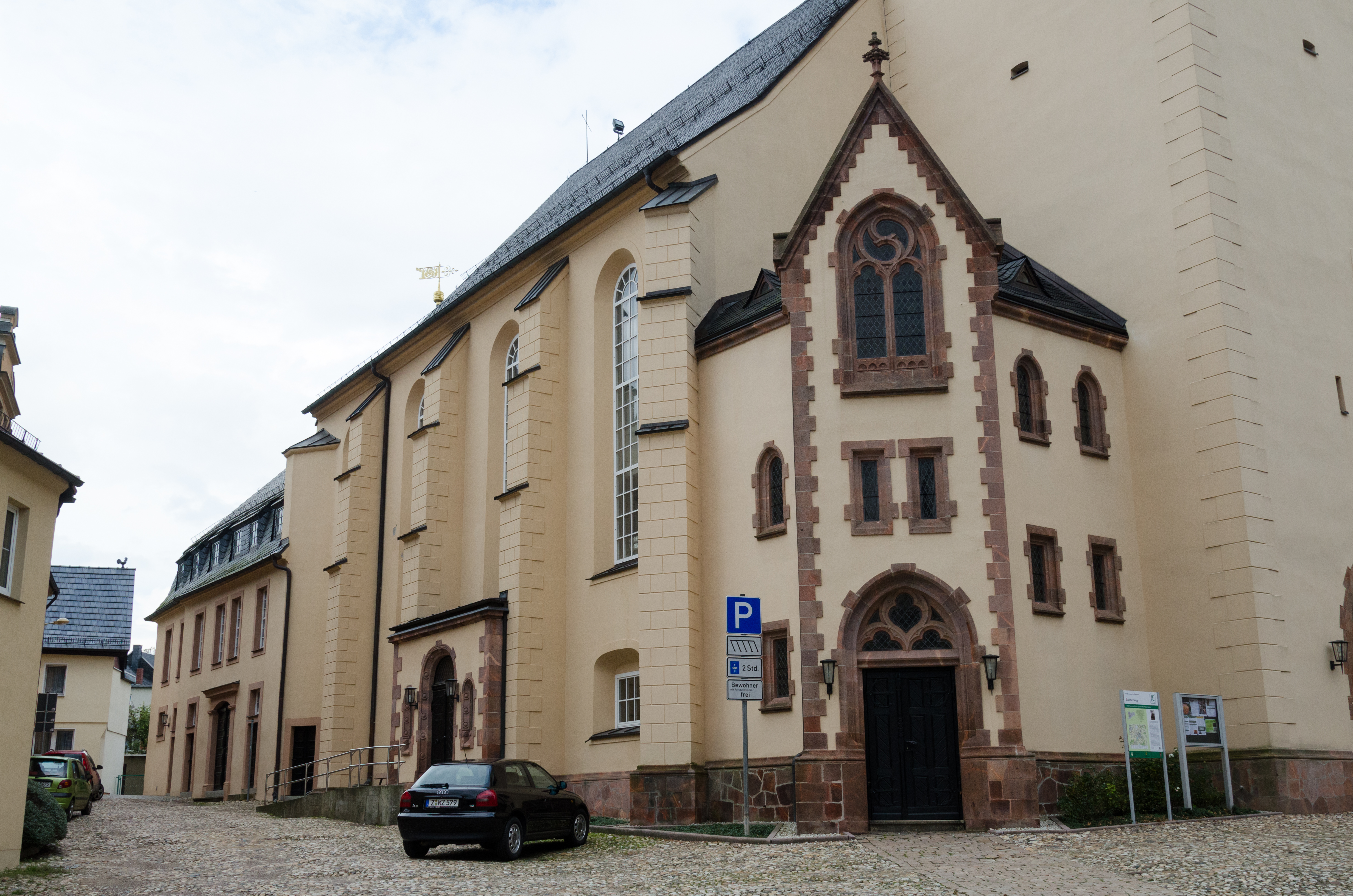 Glauchau, St. Georgen